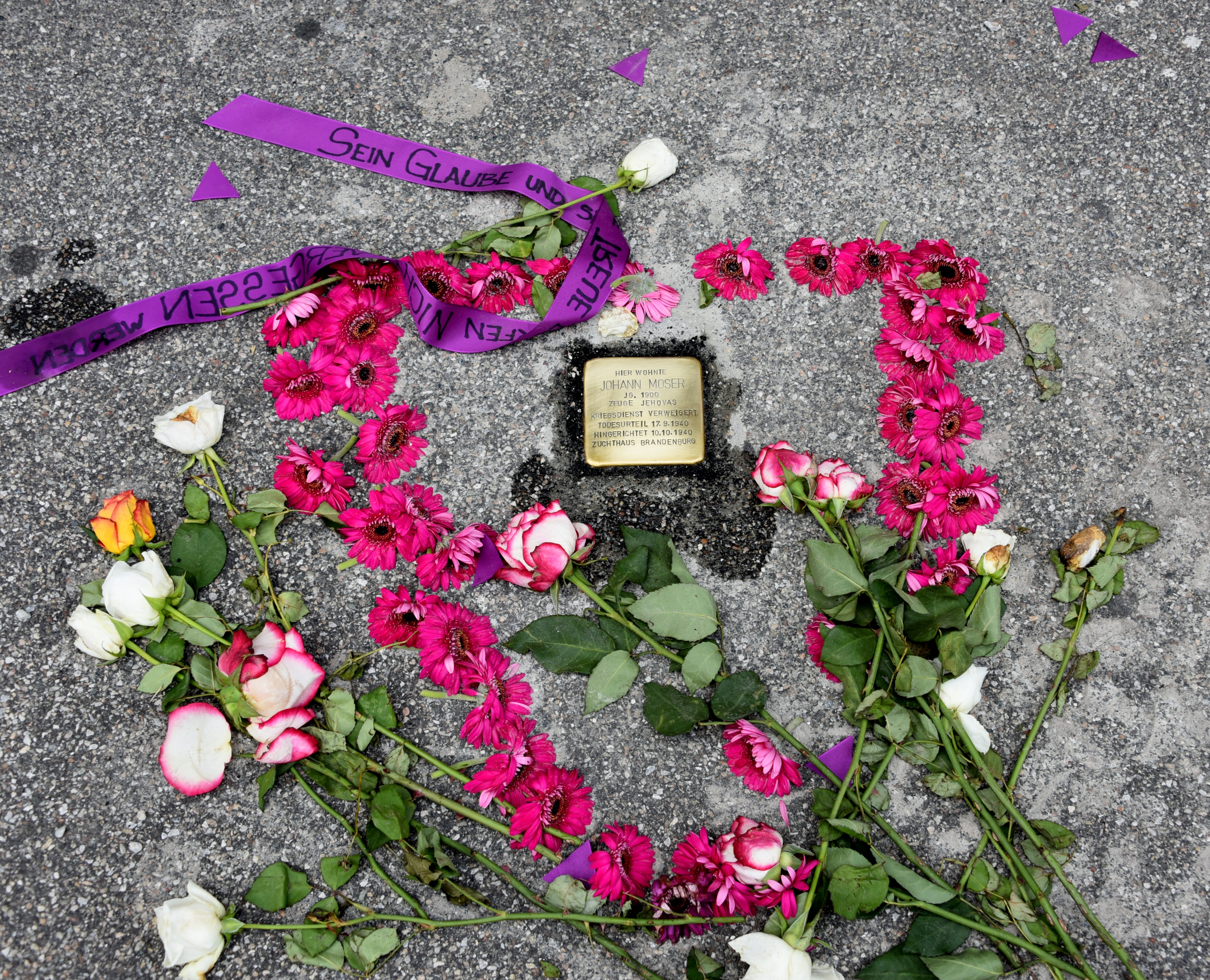 Stolperstein für Johann Moser, Reininghausstraße 50